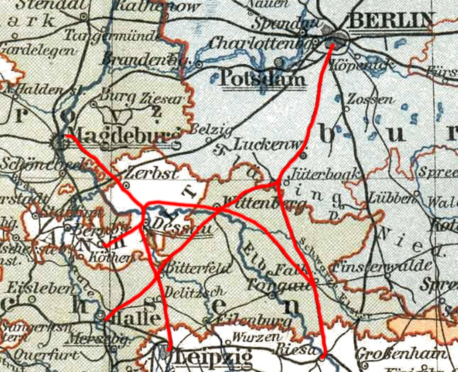 Streckennetz der Berlin-Anhaltischen Eisenbahn-Gesellschaft um 1875, basierend auf Image:Prussia (political map before 1905).jpg